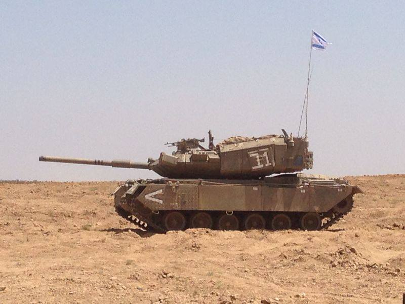 פלטפורמת שיגור "פרא" לטילי תמוז